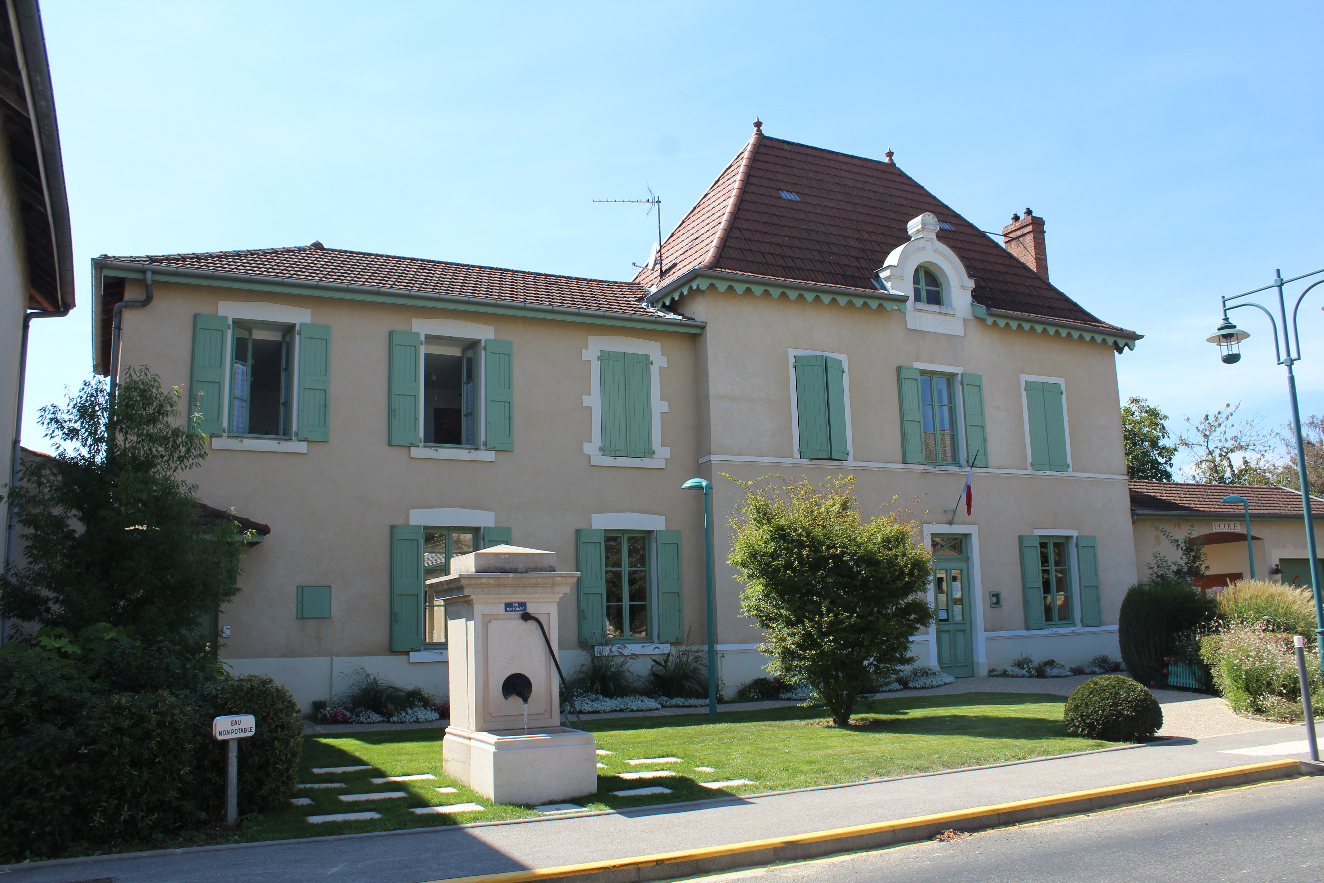 École de L'Abergement-Clémenciat.